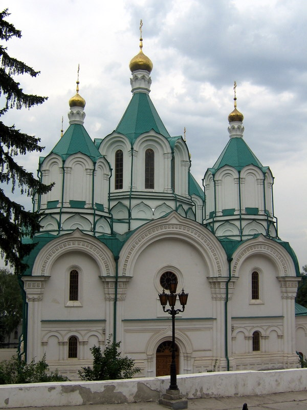 Успенский собор Святогорской лавры